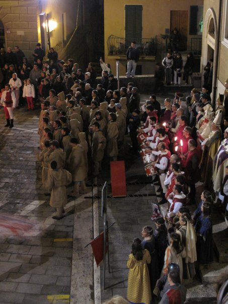 Foto dei figuranti in costume e dei torciatori sulle scale del Palazzo comunale, Torciata di San Giuseppe a Ptigliano, 19 marzo.